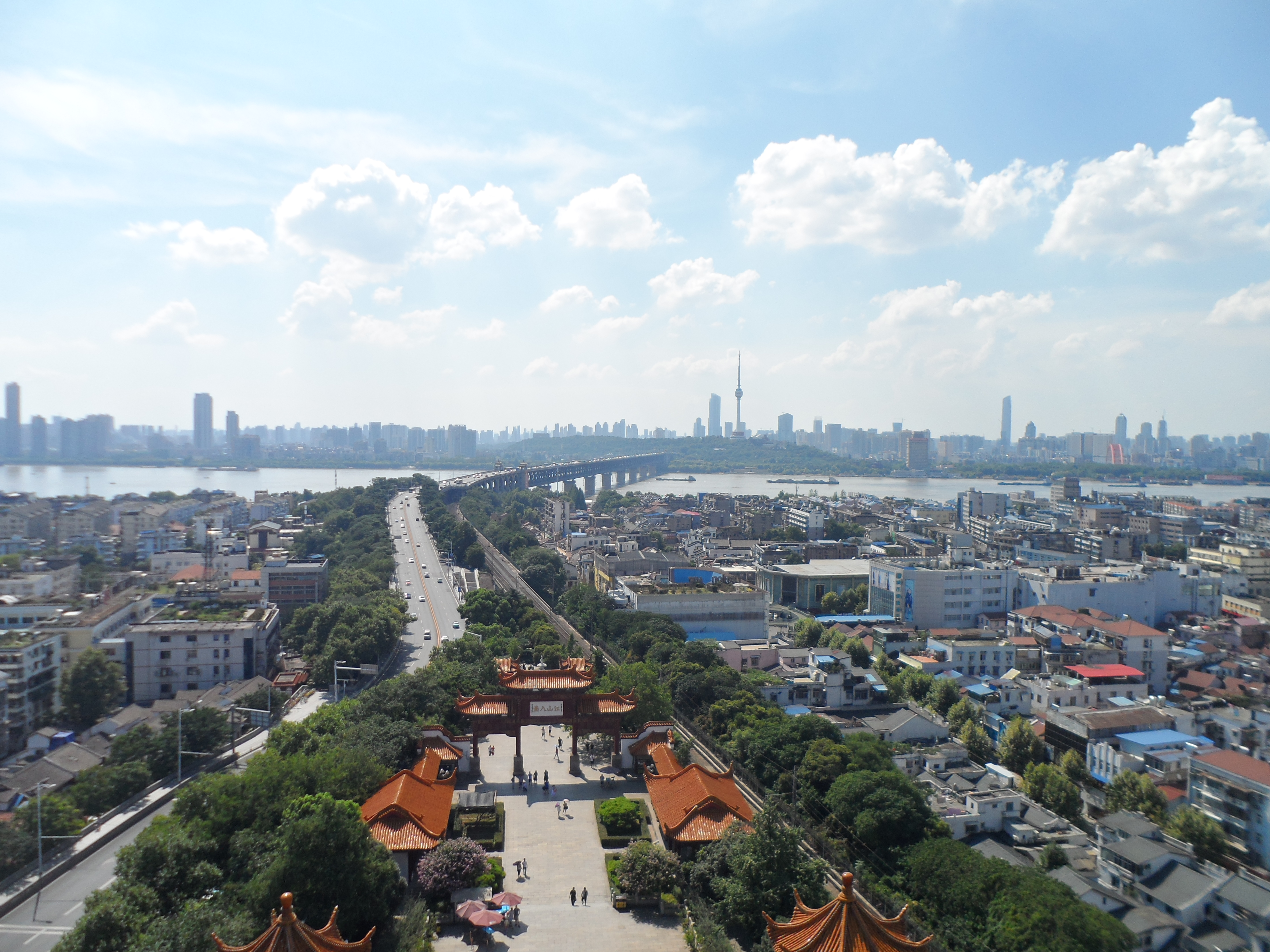 武汉黄鹤楼俯瞰